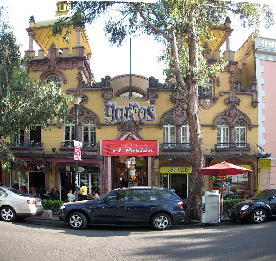 Fachada de El Parián. Álvaro Obregón 130, entre las calles de Jalapa y Orizaba, México DF. Colonia Roma Norte.